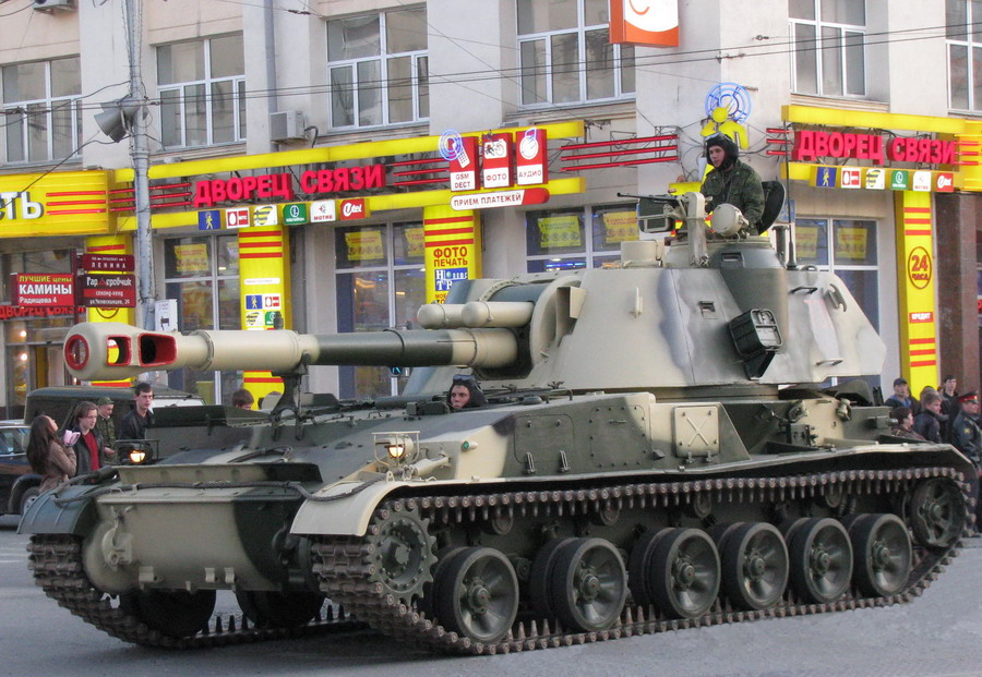 2C3 Акация на репетиции парада в Екатеринбурге